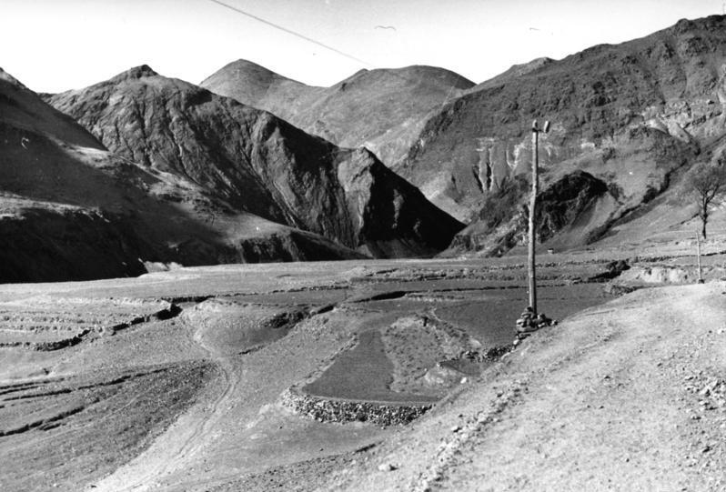 Gobschi, Karawanenstraße zwischen Gobschi und Ralung mit Landschaft